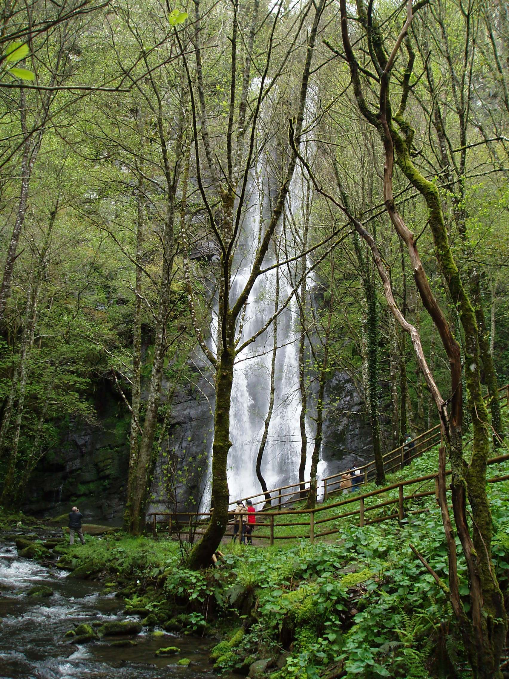 Seimeira de Vilagocende